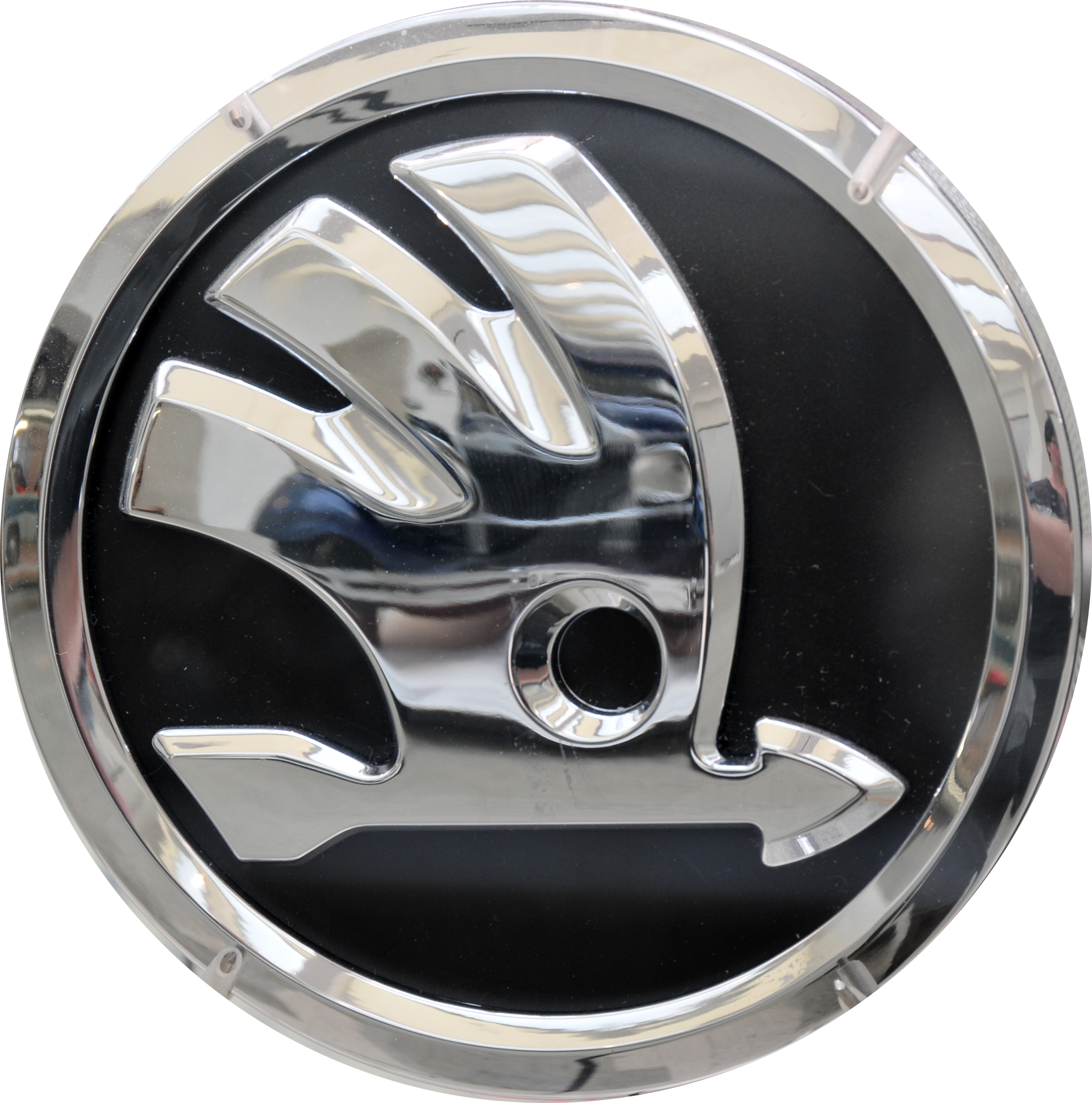 Fototermin Škoda Museum Mladá Boleslav 2013 Fototermin Škoda Muzeum 5. April 2013 in Mladá Boleslav This work is free and may be used by anyone for any purpose. If you wish to use this content, you do not need to request permission as long as you follow any licensing requirements mentioned on this page.